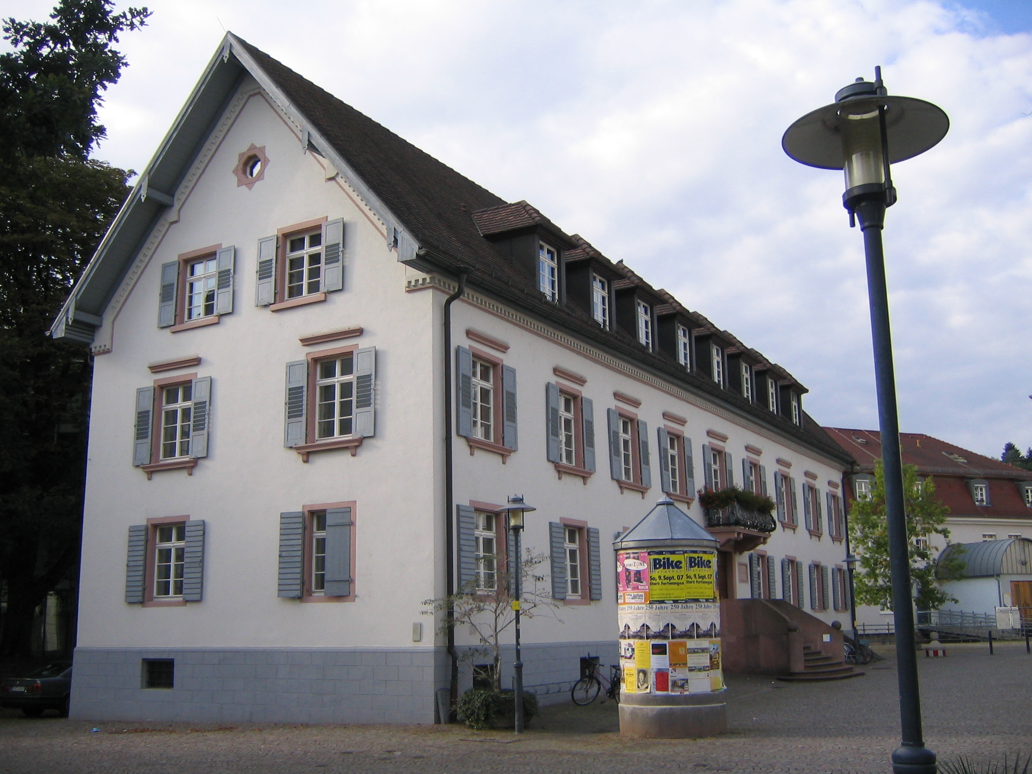 Schlosserhaus. Als Grempp'scher Hof seit 1588 im Besitz der Herrschaft. Wohnsitz für die Oberbeamten der Markgrafschaft Hachbarg. Hier lebte und starb Cornelia Goethe (1774-87, Gattin des Oberamtmanns Johann Georg Schlosser, der 1774-87 in Emmendingen wirkte). Nach Verkauf Nutzung als Brauereigaststätte. Erstes Haus in Emmendingen mit elektrischer Beleuchtung.